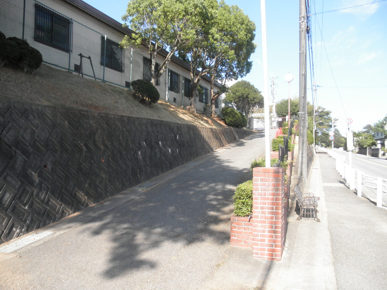 神戸市立神出中学校